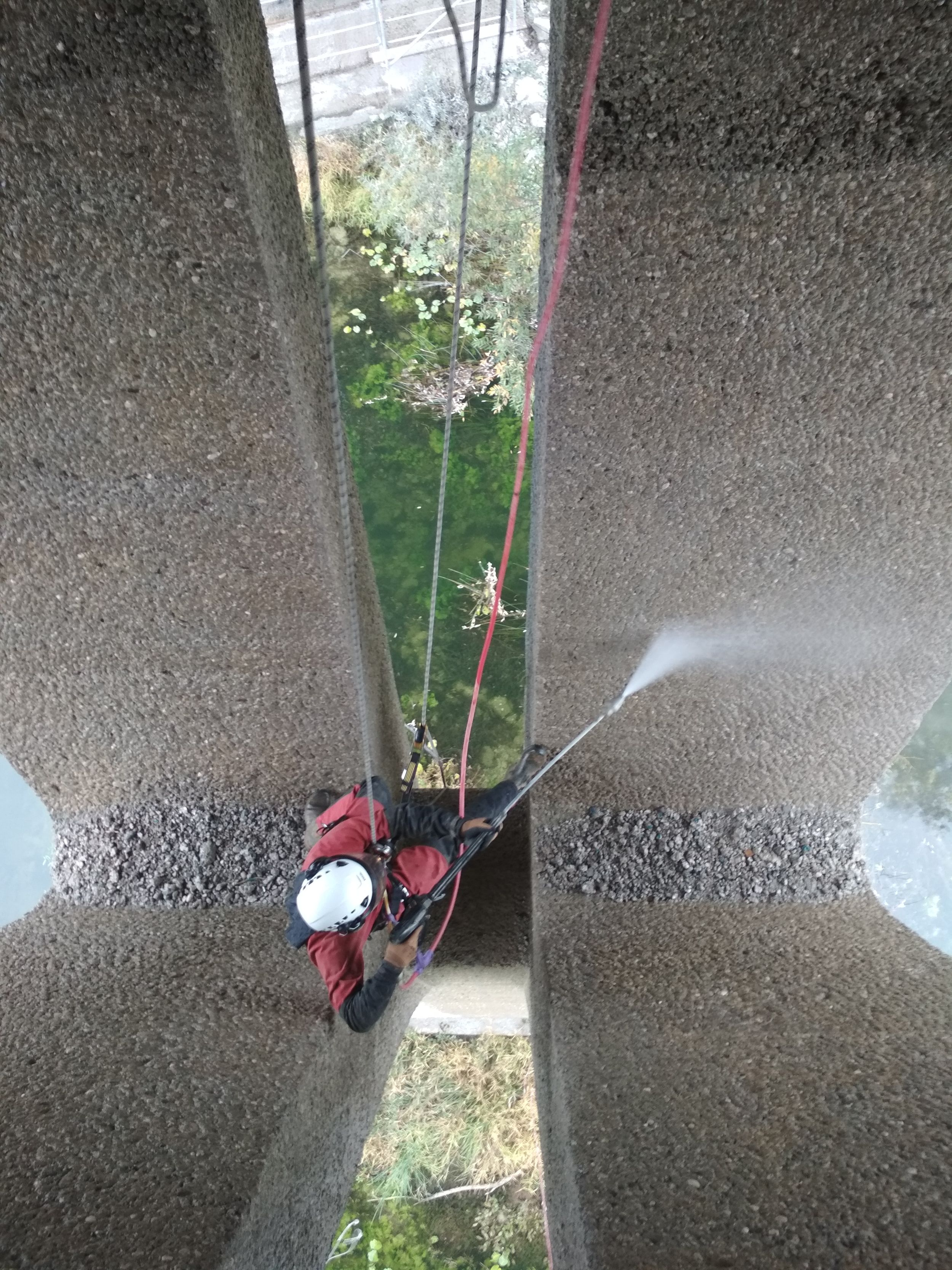 Pranje na visini